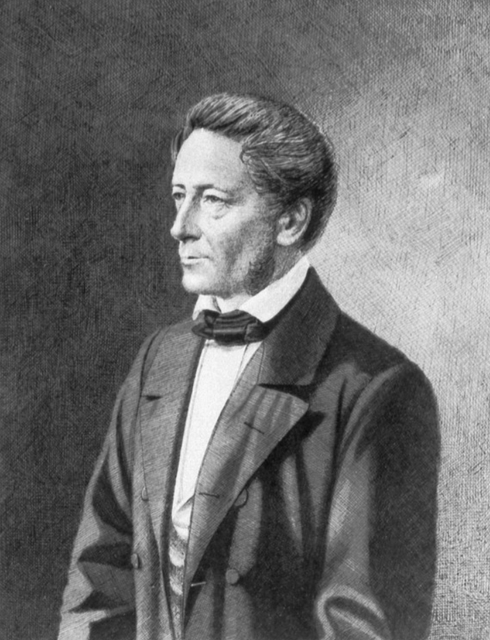 Rudolf Kohlrausch, (* 6. November 1809 in Göttingen; † 8. März 1858 in Erlangen) German physicist